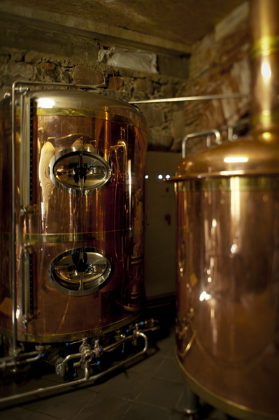 Tarnų name įrengtame bravore gaminamas Vasaknų dvaro alus